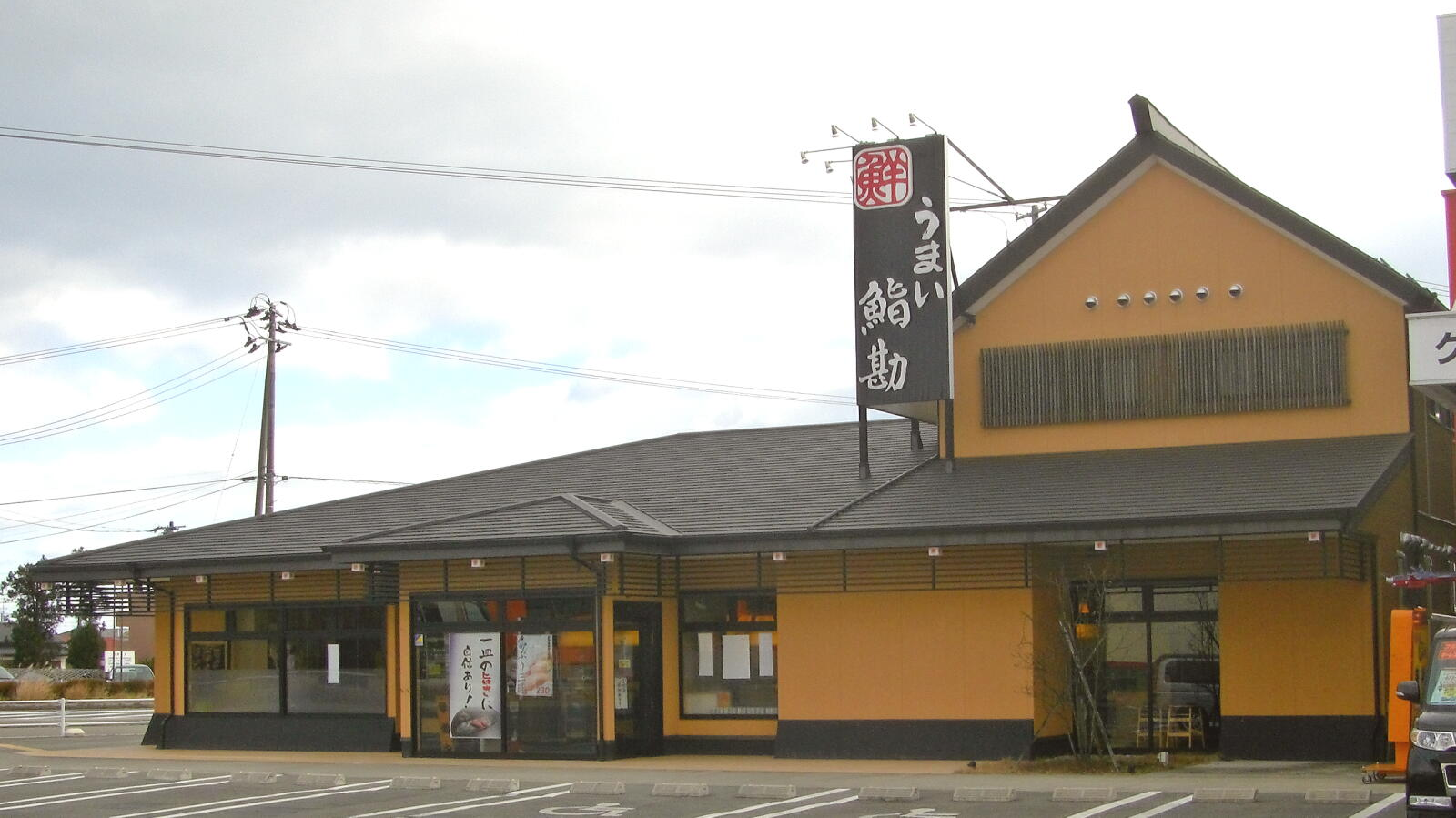 うまい鮨勘原町支店